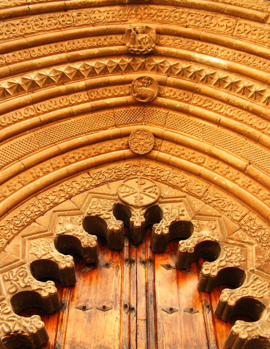 Portada románica de la iglesia parroquial de San Román en Cirauqui (Navarra, España).